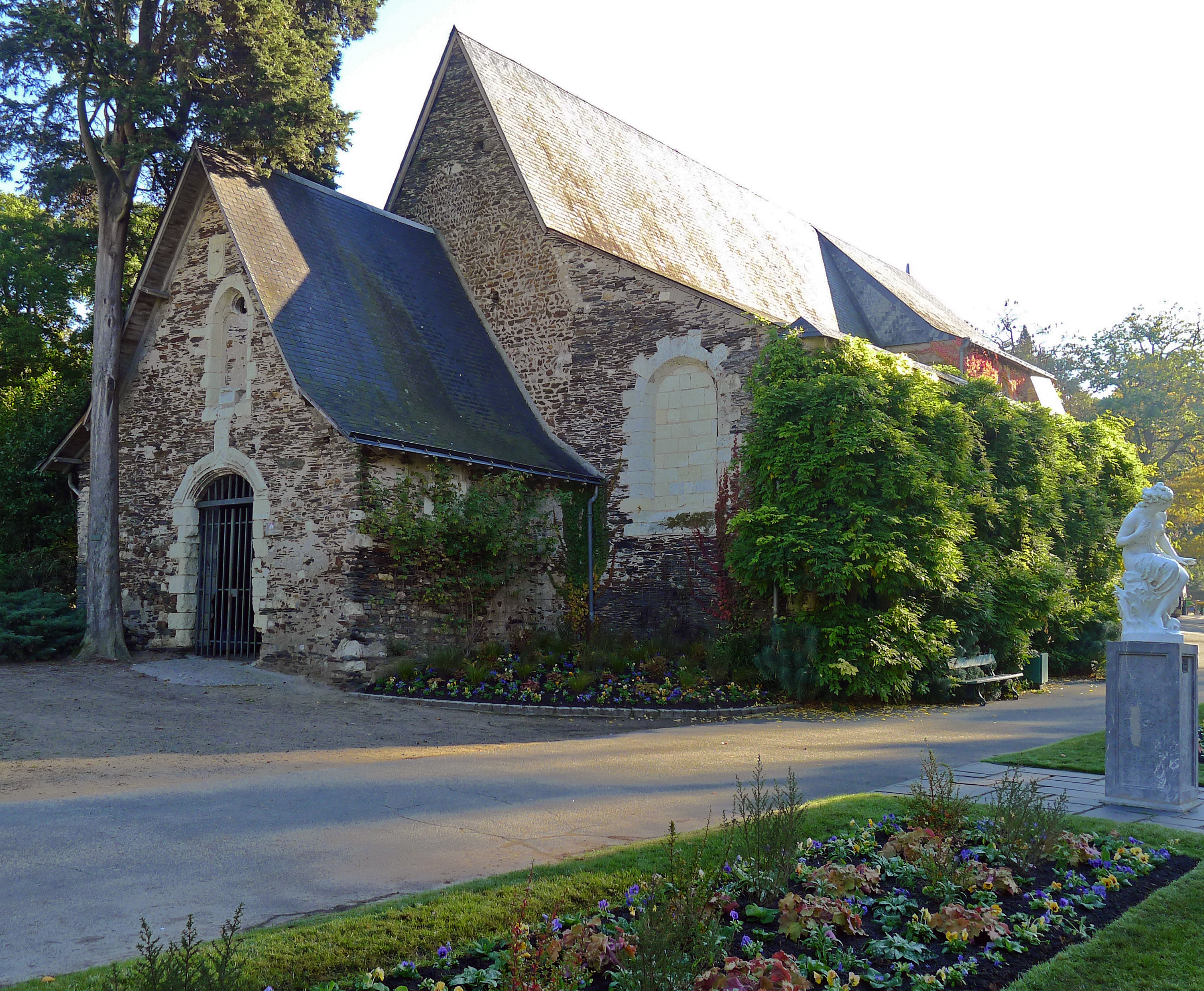 Église Saint-Samson d'Angers dans le jardin des plantes de la ville.